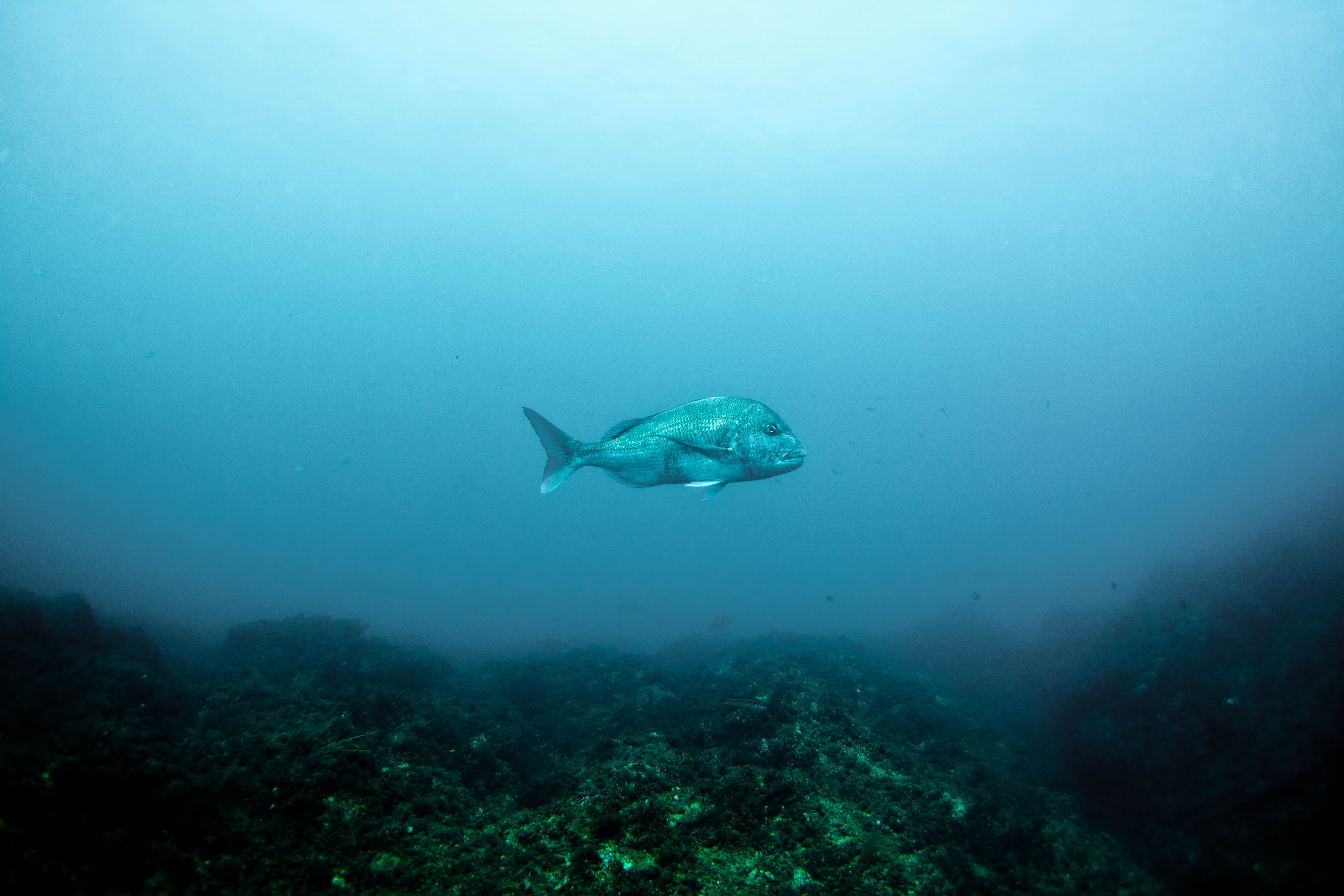 Red seabream aka マダイ